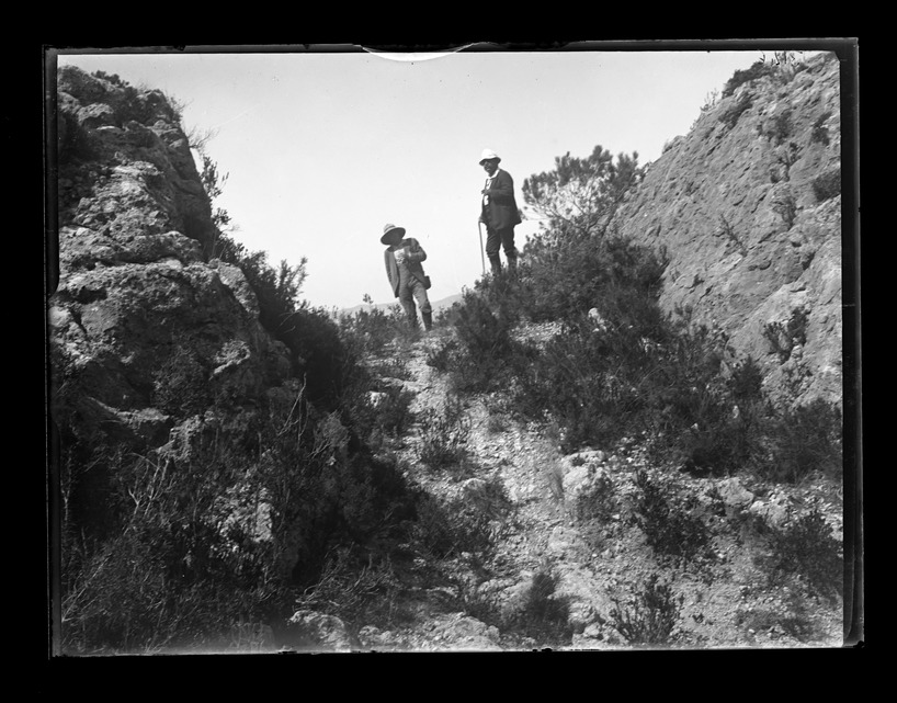 Camí d'accés a la porta oriental del jaciment de Covalta (Albaida). 1919 [Arxiu Negatius - 3146]